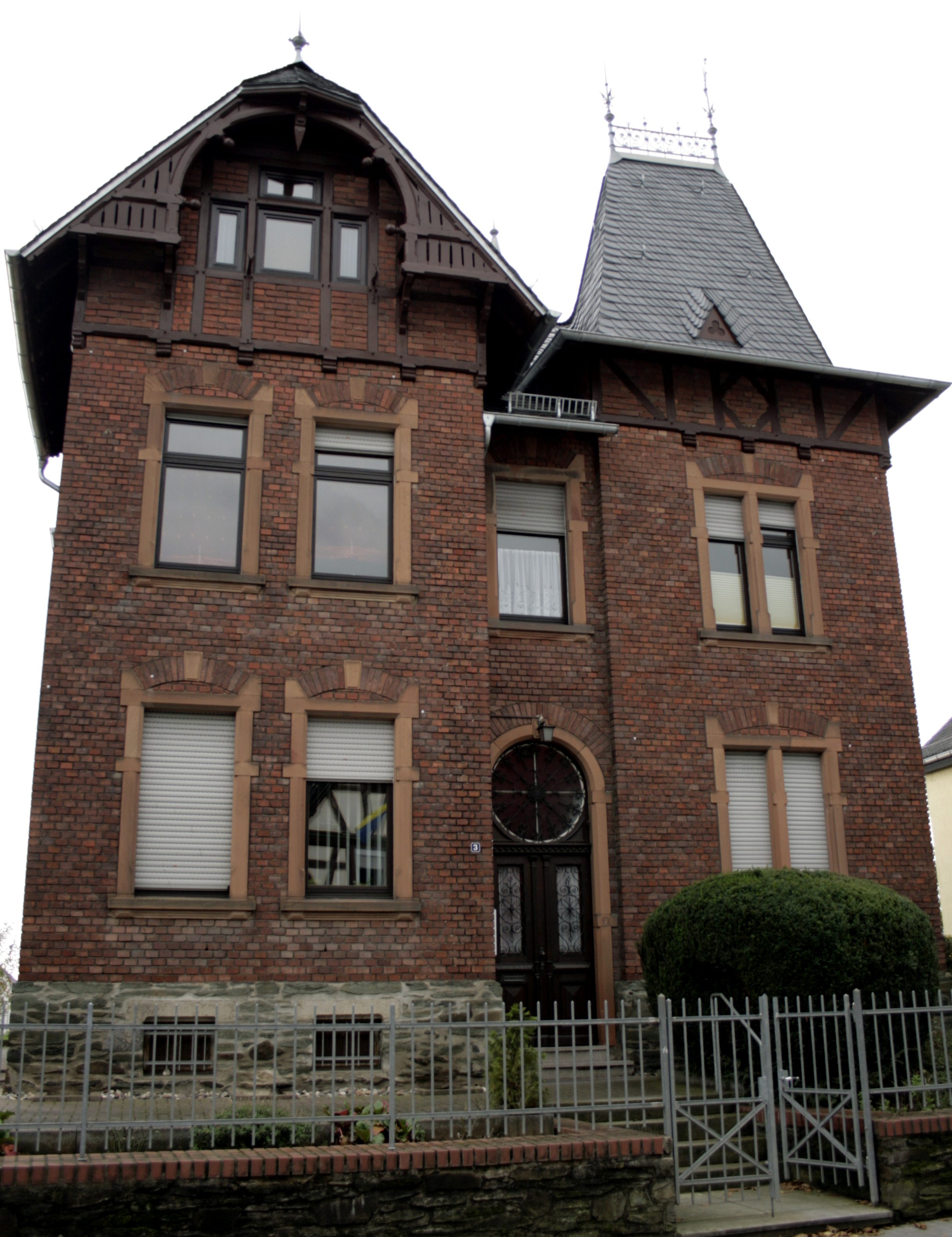 Pfarrhaus in Elz, Deutschland